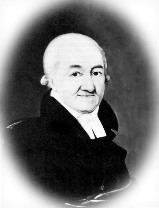 Август Готтфрид Вол (August Gottfried Wahl)